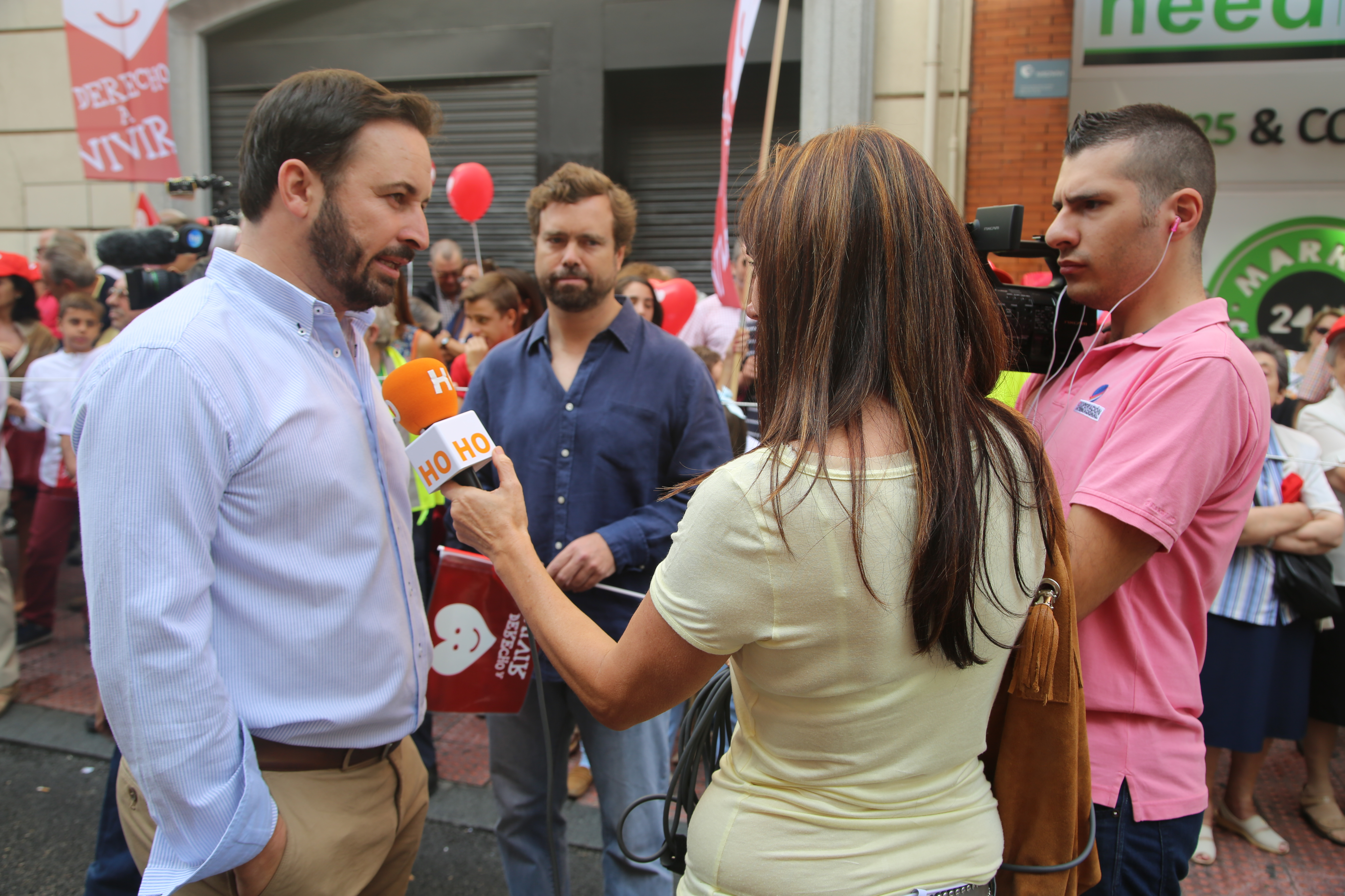 21.9.2014 V Marcha por la Vida